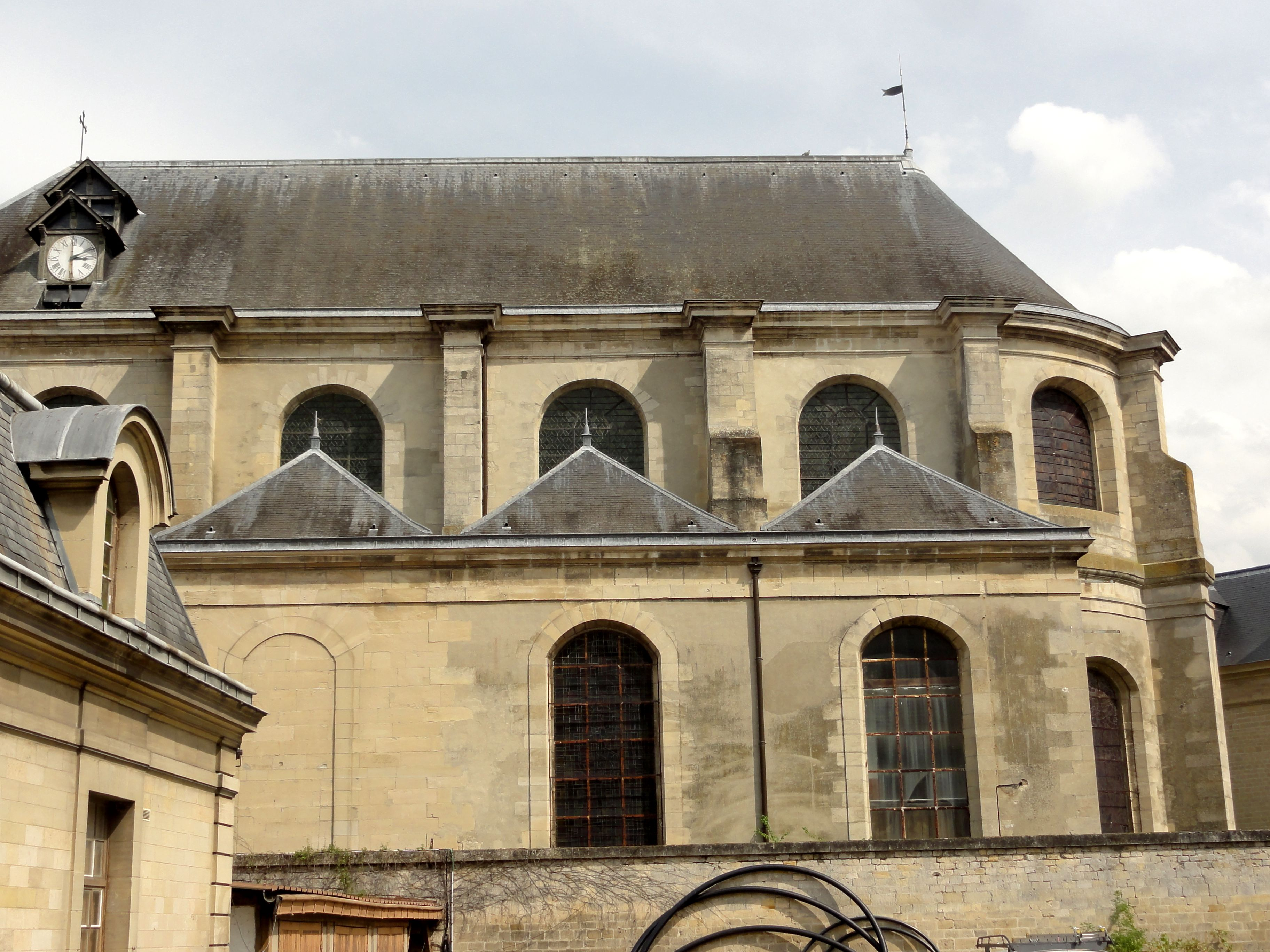 Vue depuis le sud, depuis le parking du personnel des Grandes écuries ; à gauche, une maison de gardien qui limite la vue ; en bas, un mur empêche de voir les parties basses de l'église.